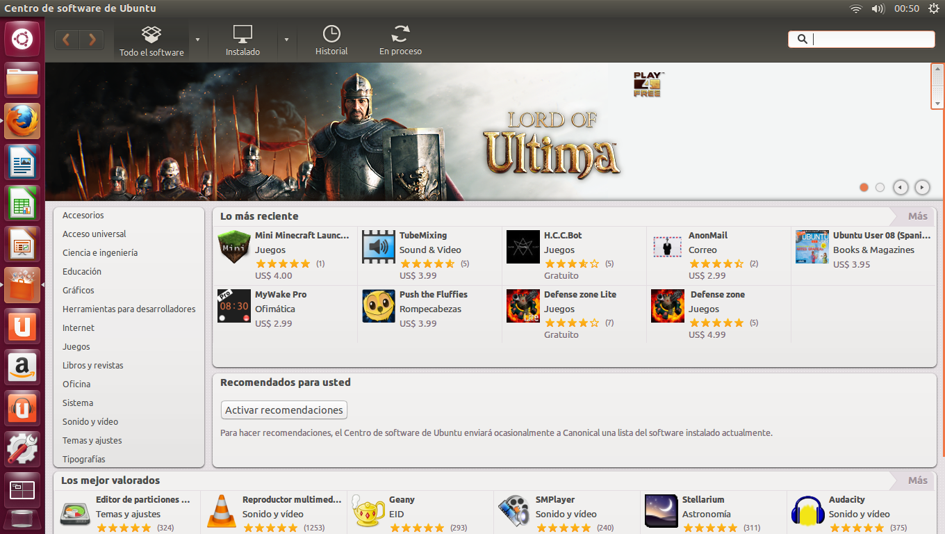 Captura de Software Center en Ubuntu 12.10